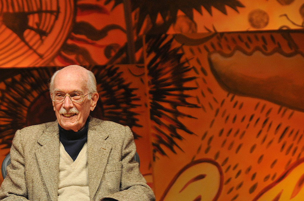 Antonio Candido na solenidade de abertura da 9ª Festa Literária Internacional de Parati (RJ), em 6 de julho de 2011. Foto: André Gomes de Melo